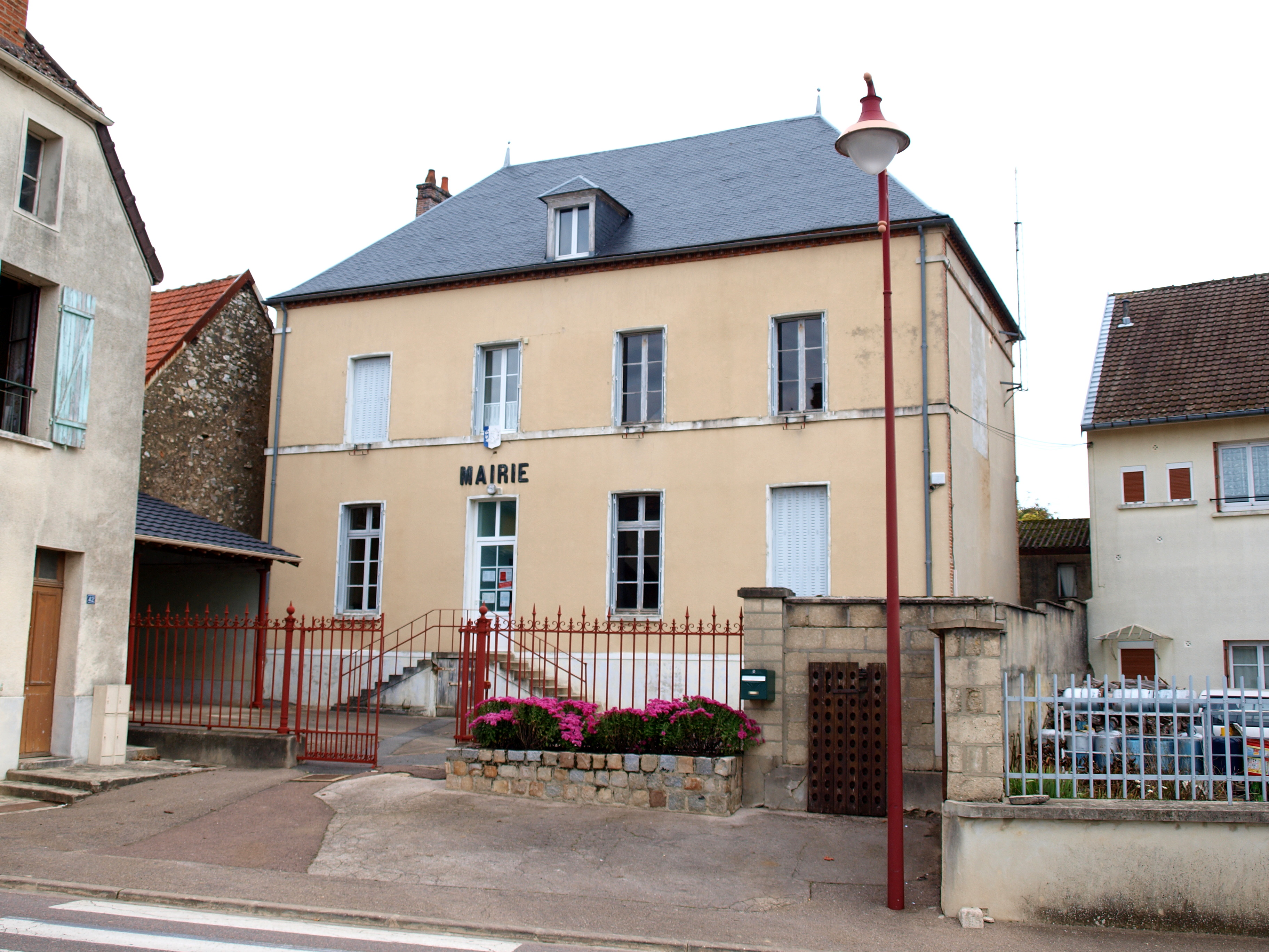 Bethon (Aisne, France) ; mairie